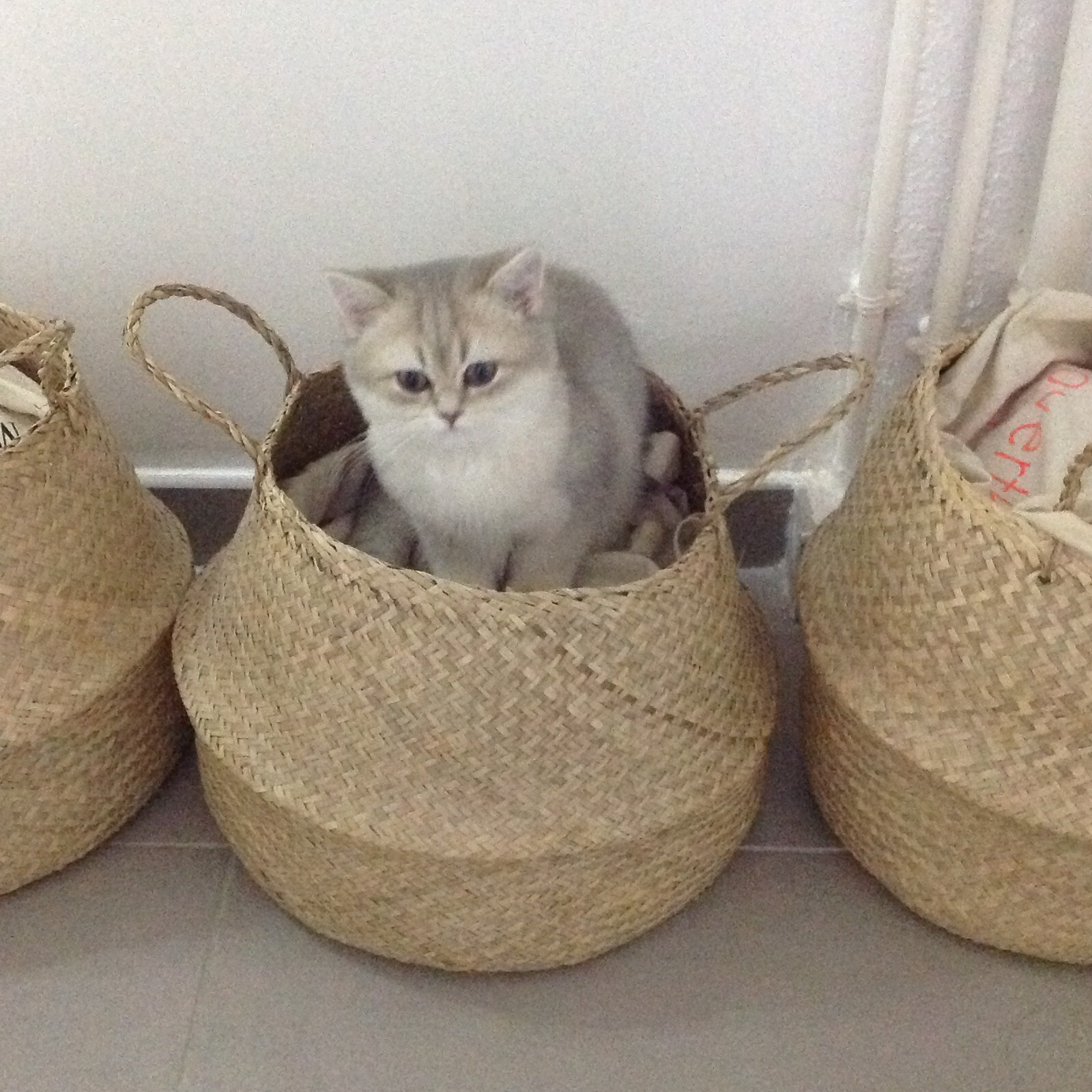 Chaton British Shorthair Golden Blue de 3 mois.